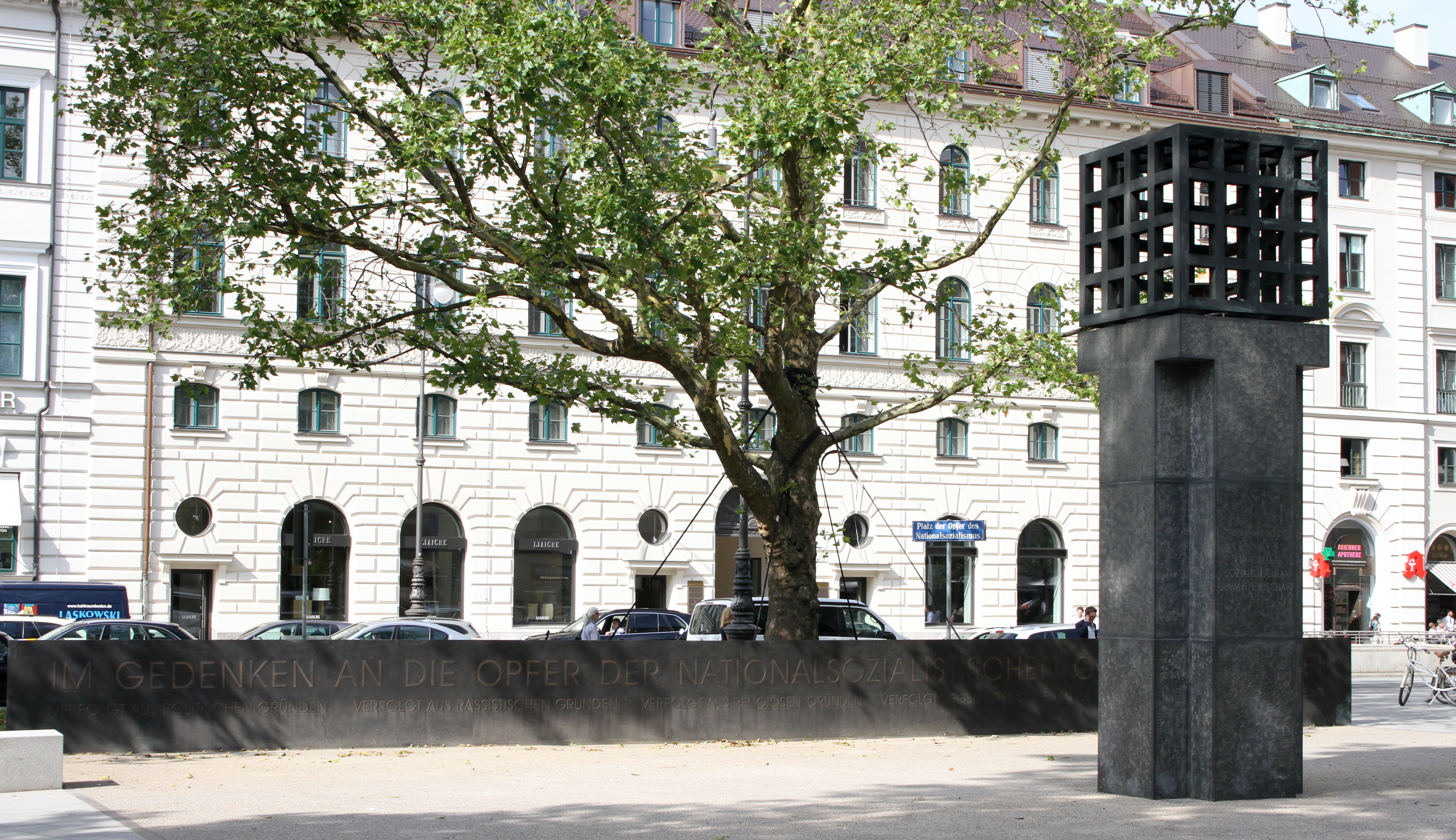 Platz der Opfer des NAtionalsozialismus, München. Säule mit der Ewigen Flamme vor der langgestreckten Gedenktafel